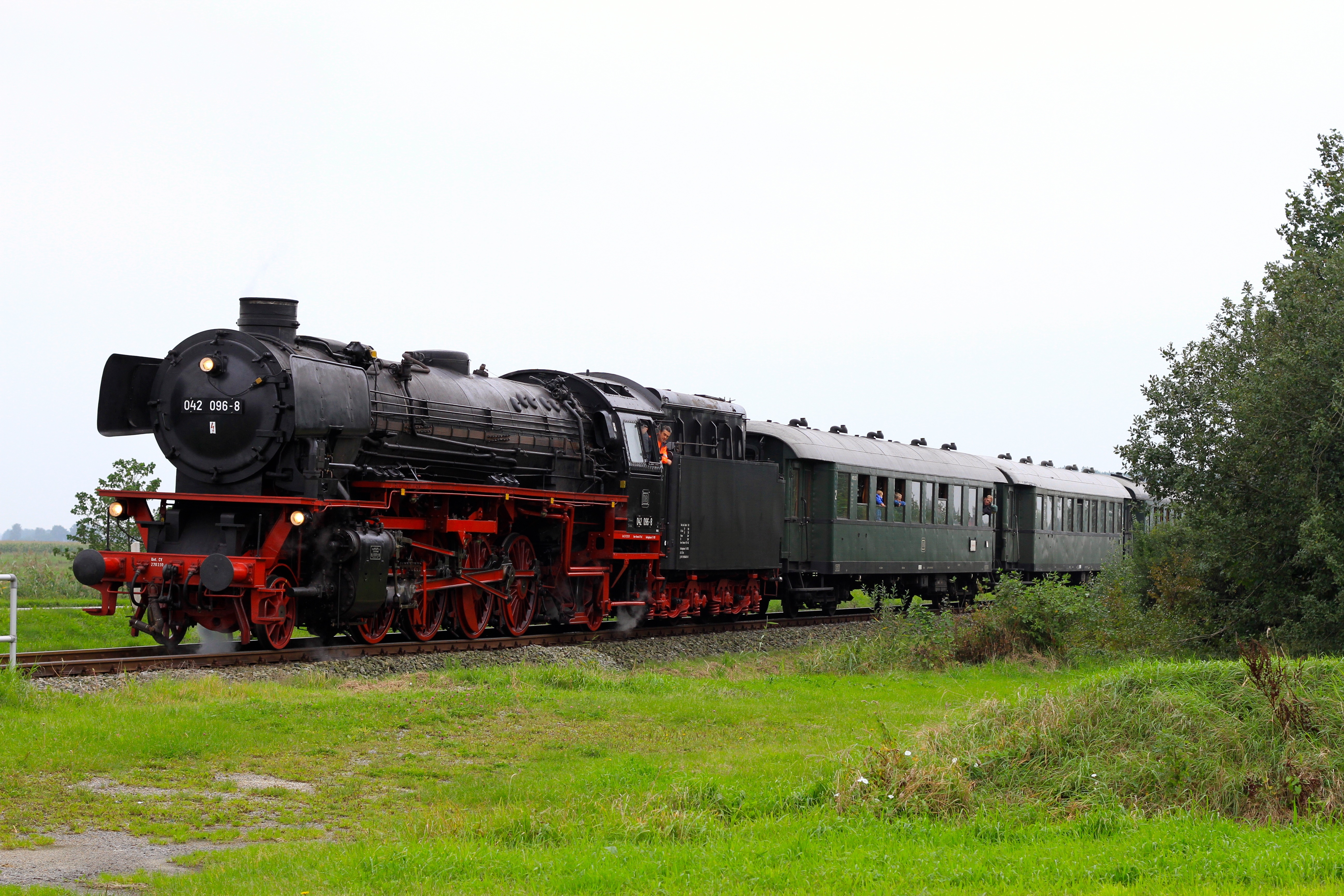 Historische Dampflok in Uthwerdum